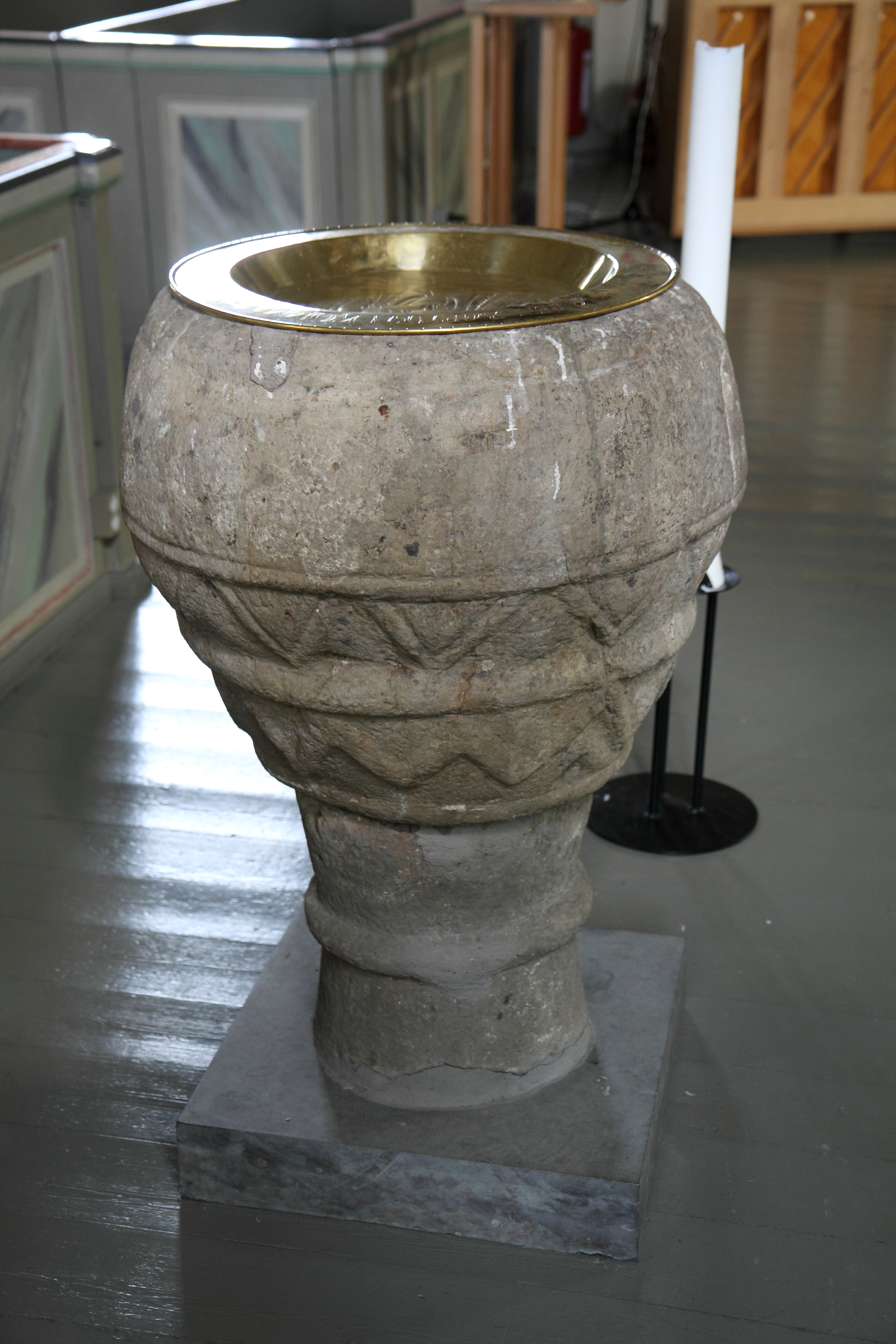 Dopfunt i Blidsbergs kyrka.